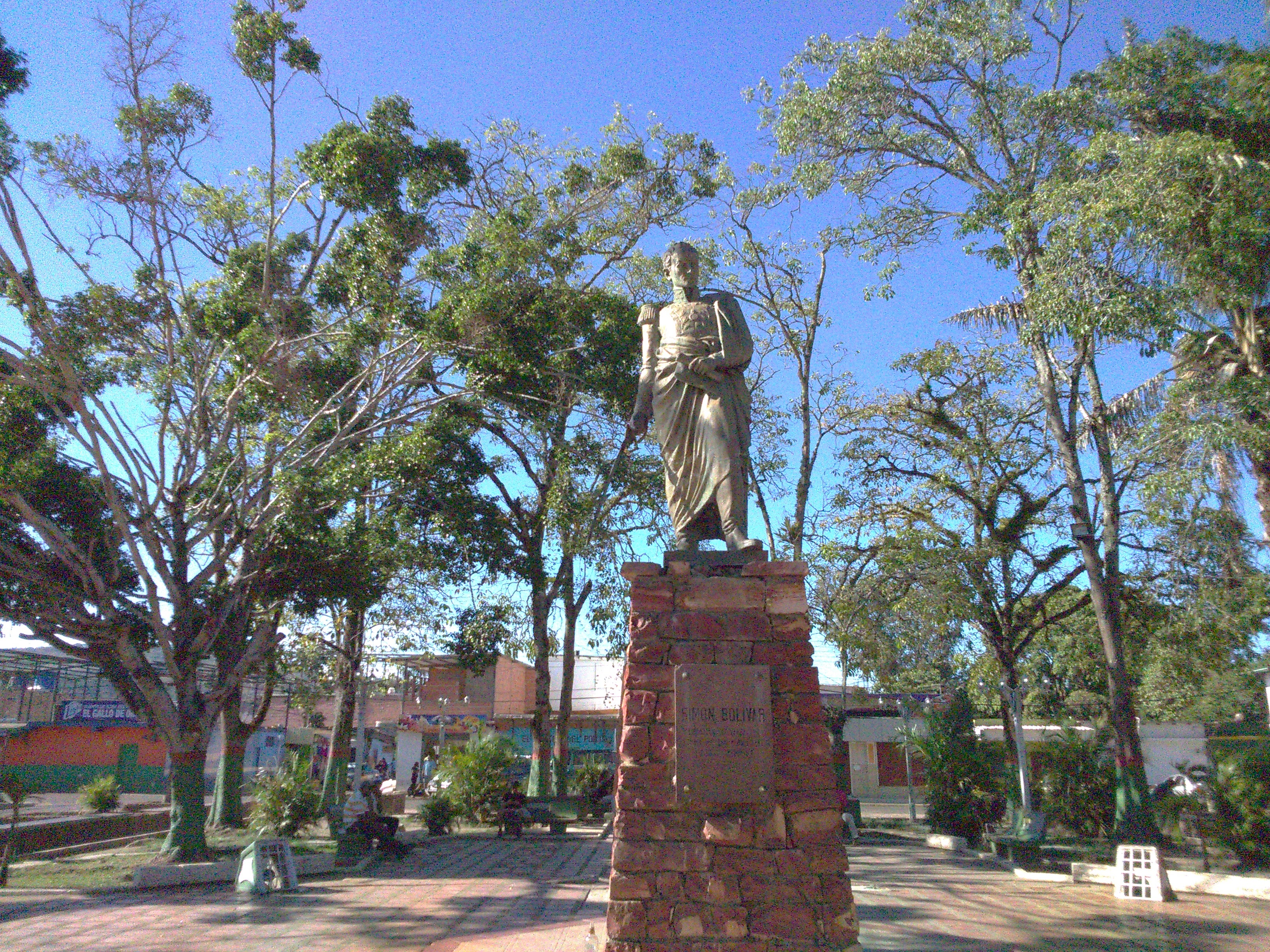 Sector 10, Santa Elena de Uairén, Bolívar, Venezuela